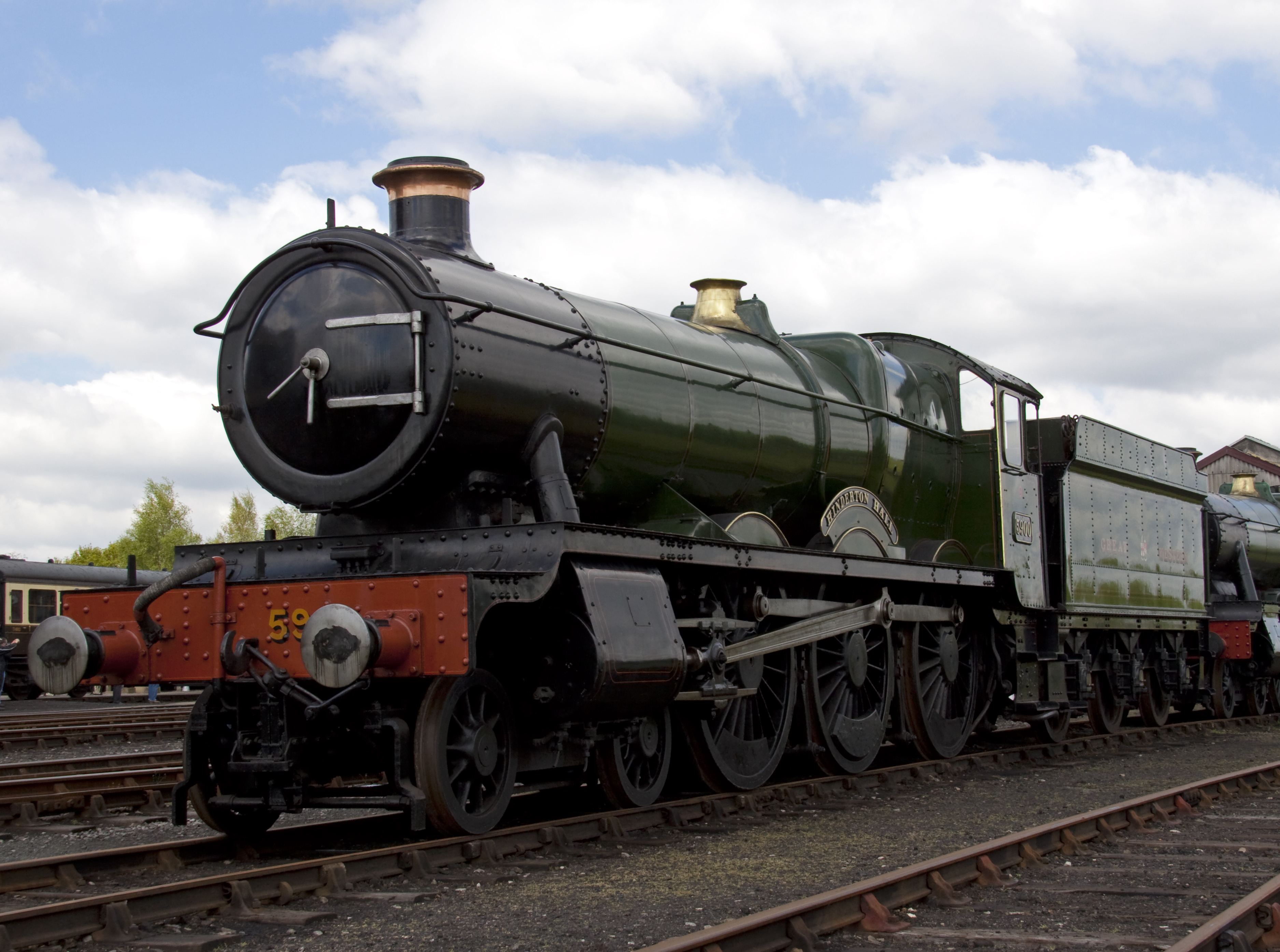 Hinderton Hall 5900 2